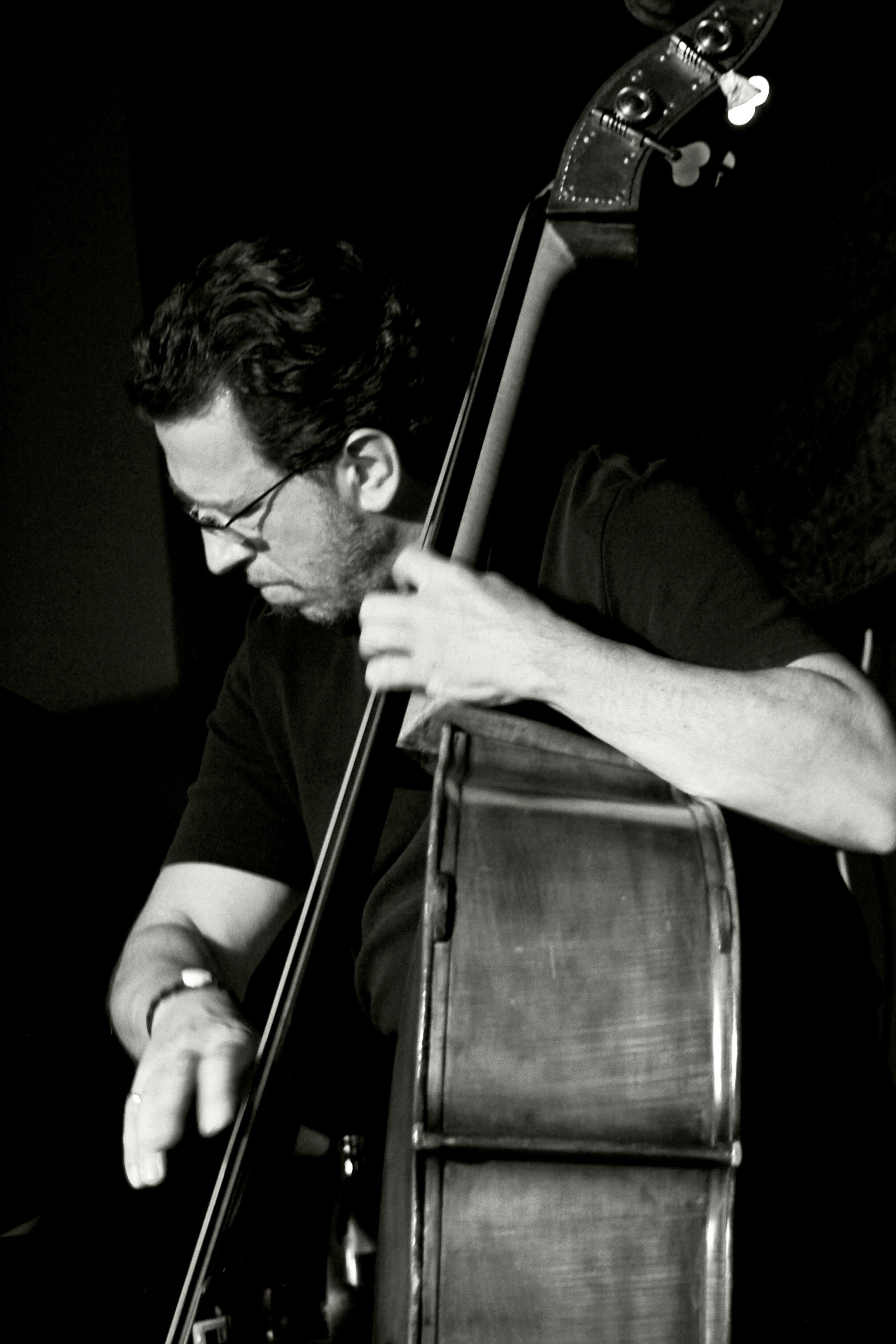 Johannes Schaedlich, Konzert (mit Caroline Pook, viol/Martin Preiser, p/Oliver Strauch, dr) am 28.06.2007 im Jazzclub "Domicile Leidinger" Saarbrücken